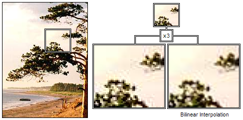 Пример использования билинейной интерполяции при ресемплинге изображения. Приведены два примера троекратного увеличения выбранного куска изображения - простое масштабирование и обработка методом билинейной интерполяции.